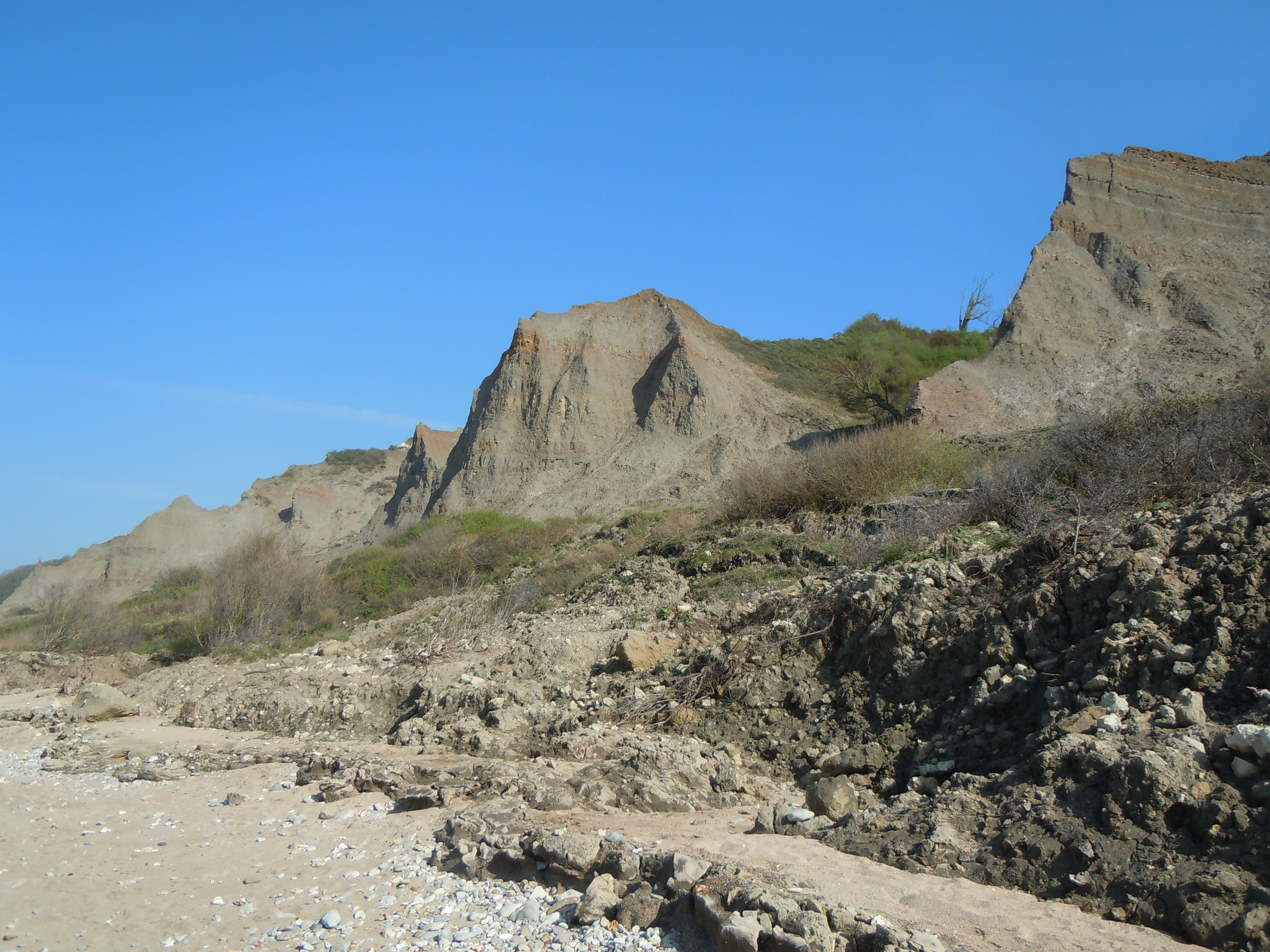 Falaises des Vaches Noires - Calvados - France